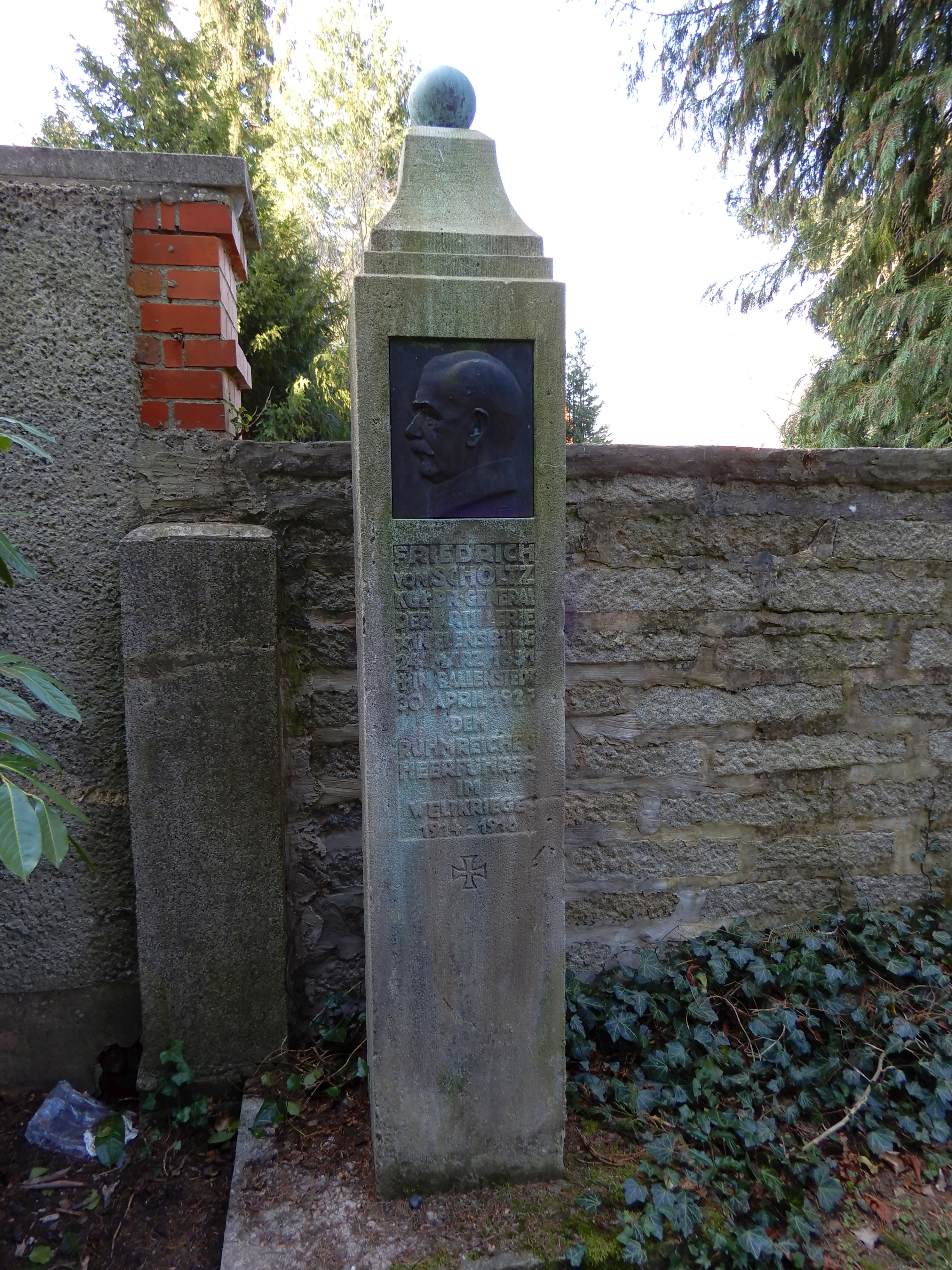 Grabmal auf dem Friedhof Ballenstedt